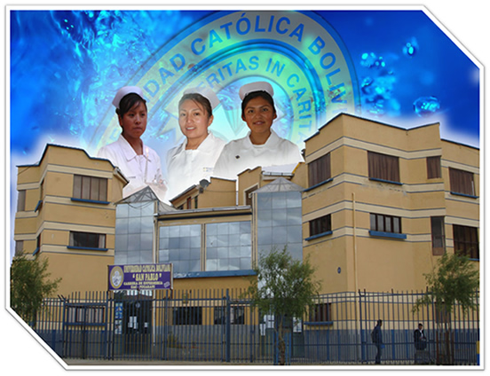 UAC Pucarani